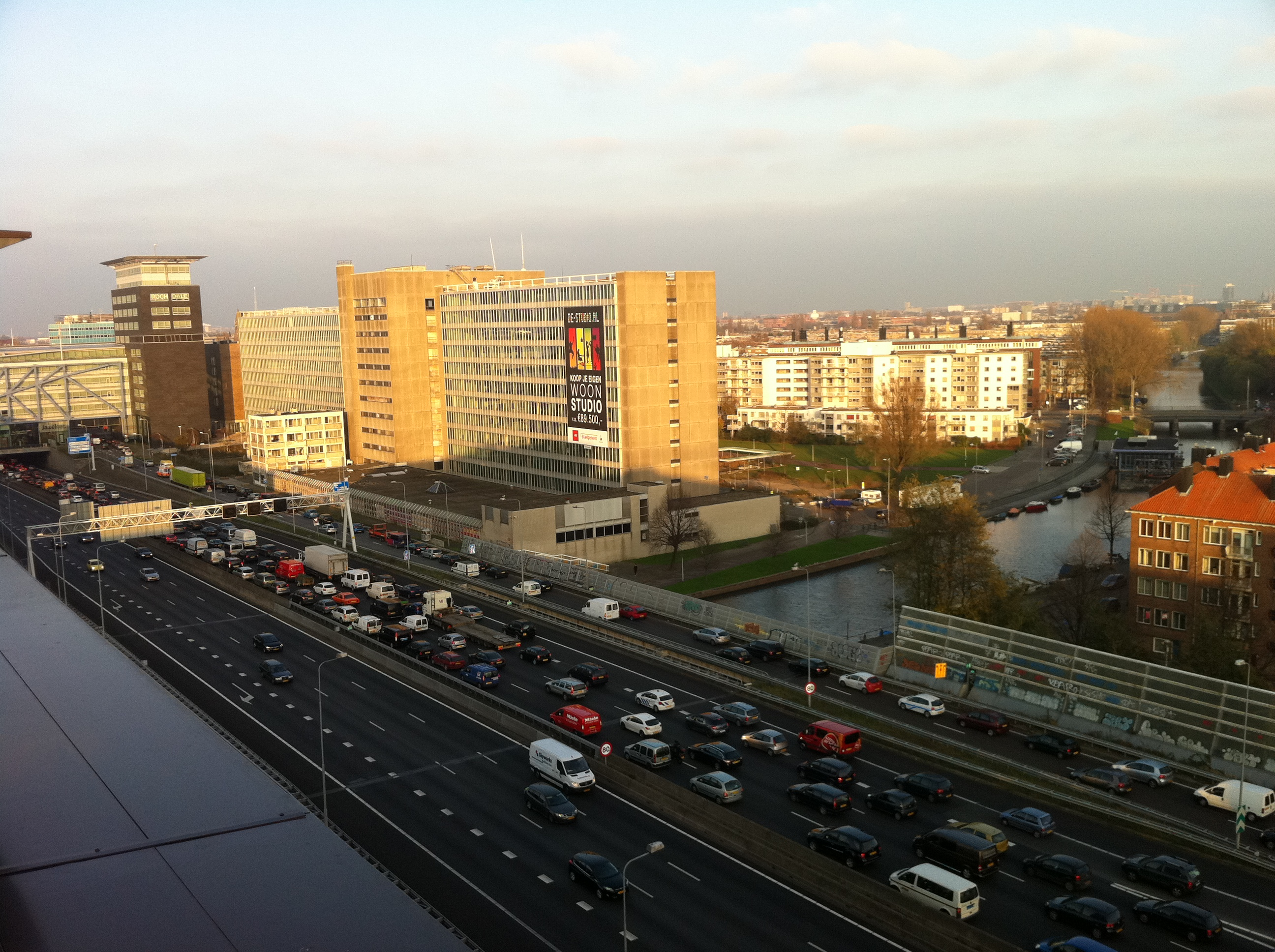 Amsterdam - file op Einsteinweg richting Coentunnel ter hoogte van Bos en Lommer; rechts op de achtergrond brug 162 (Saïdja en Adindabrug), links op de voorgrond brug 142P (Erasmusgrachtbrug)